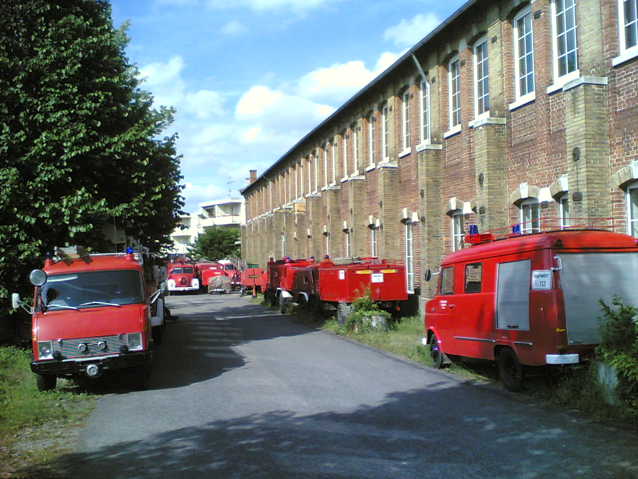 Fire Engine Museum in Stuttgart-Münster